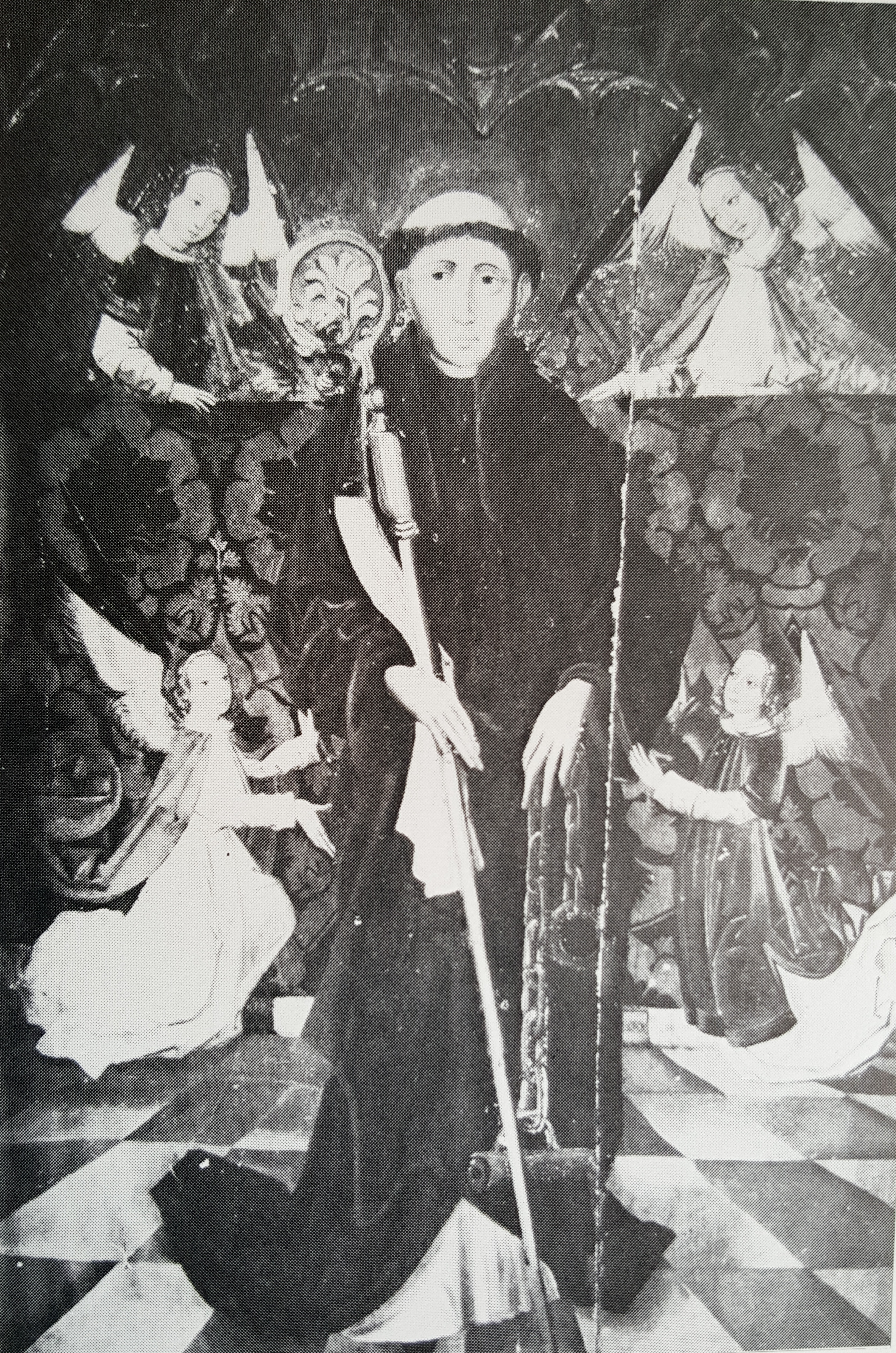 Święty Leonard i, Mistrz Zwiastowania z Jodłownika, ok 1500-1510